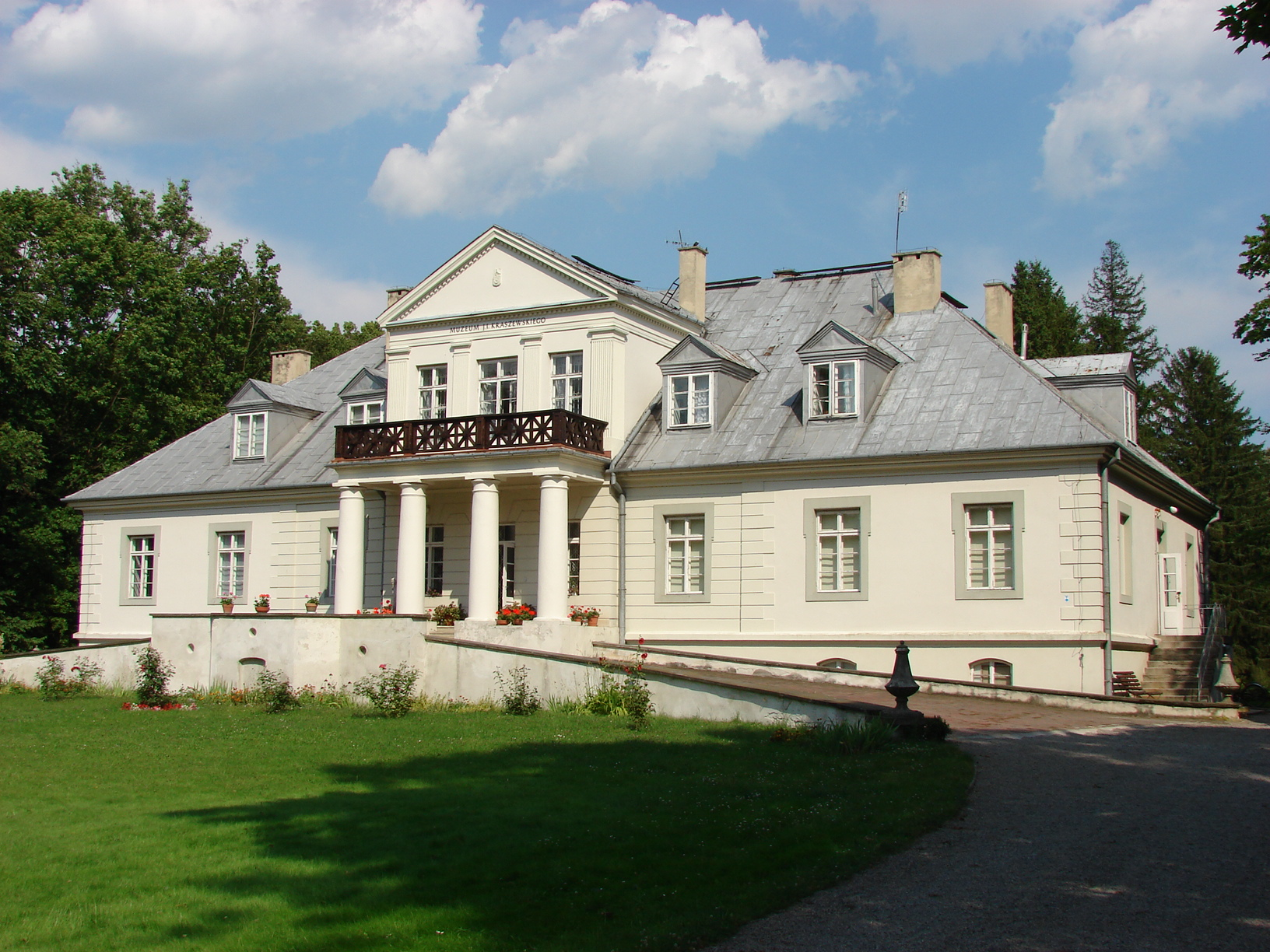 Беларуская (тарашкевіца): Музэй Язэпа Крашэўскага ў Раманаве (Польшча)